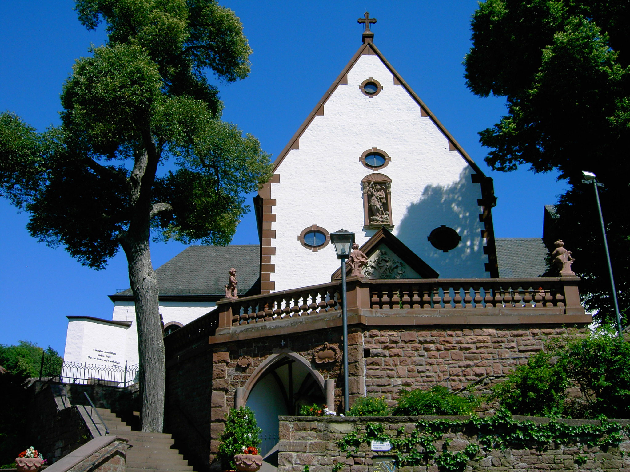 Kloster Engelberg bei Großheubach. Blick auf Eingang der Kirche/Kapelle.